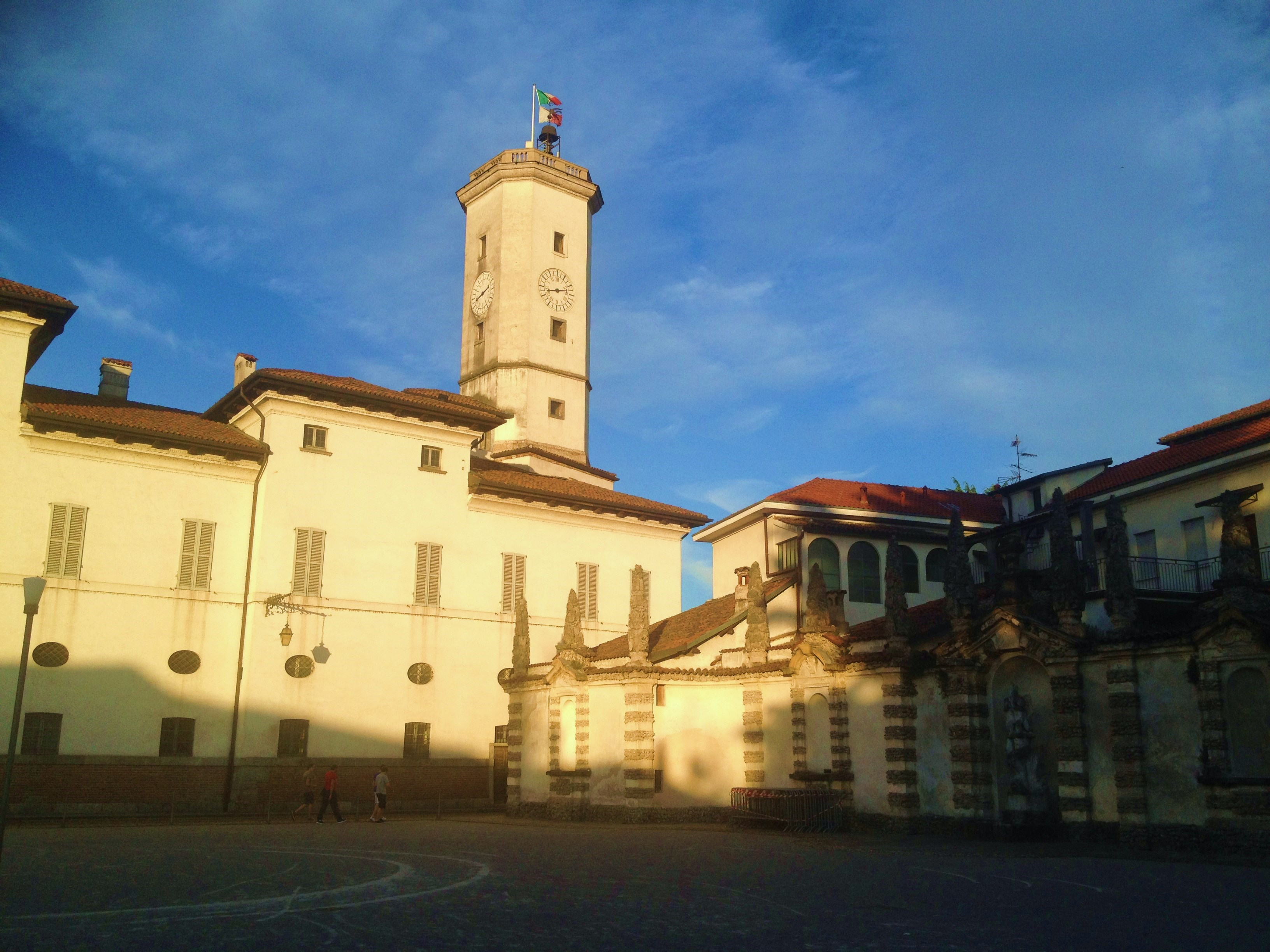 Facciata esterna di Palazzo Arese Borromeo vista da Piazza Esedra This is a photo of a monument which is part of cultural heritage of Italy.